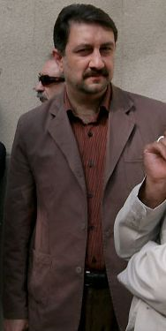 حسین سلیمی - مرداد ۱۳۸۸